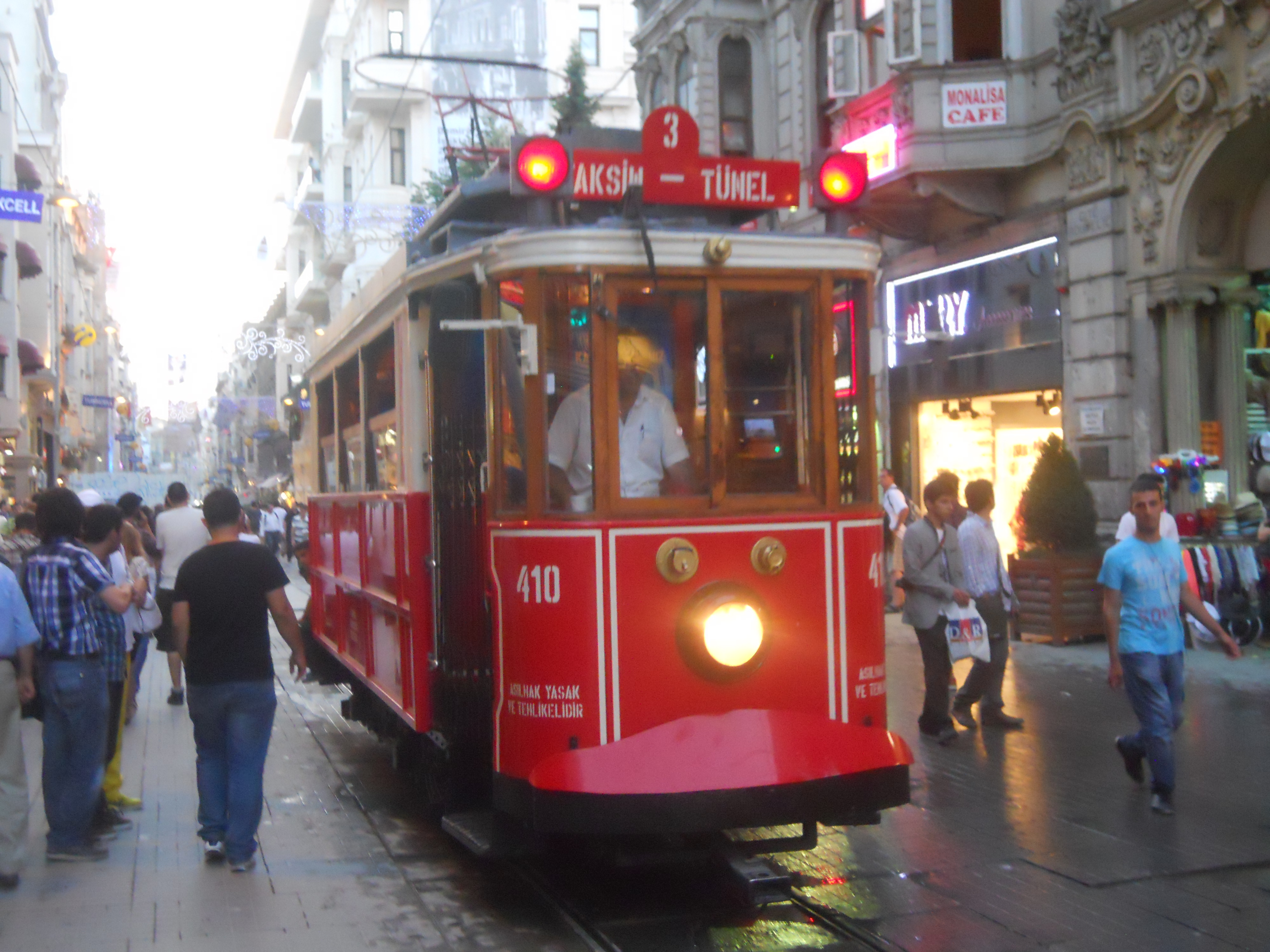 Tram nostalgico in arrivo a Piazza Taksim